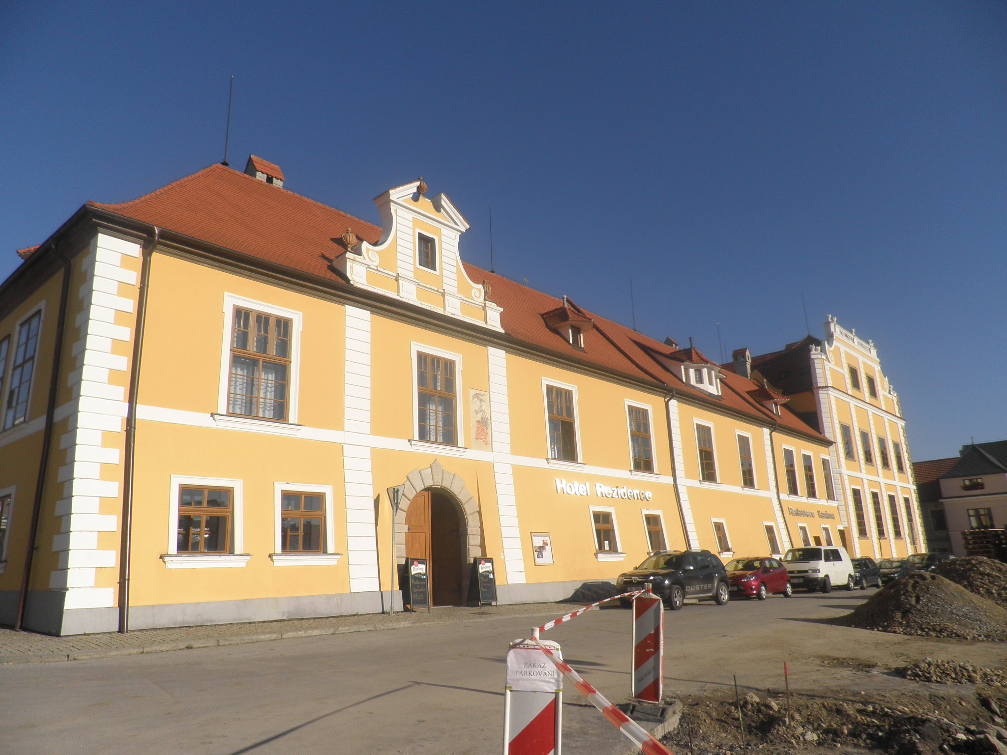 Lázeňský dům Rezidence, nám. 1, Nové Hrady